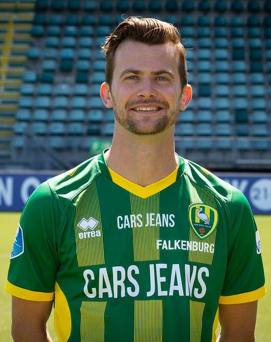 Erik Falkenburg